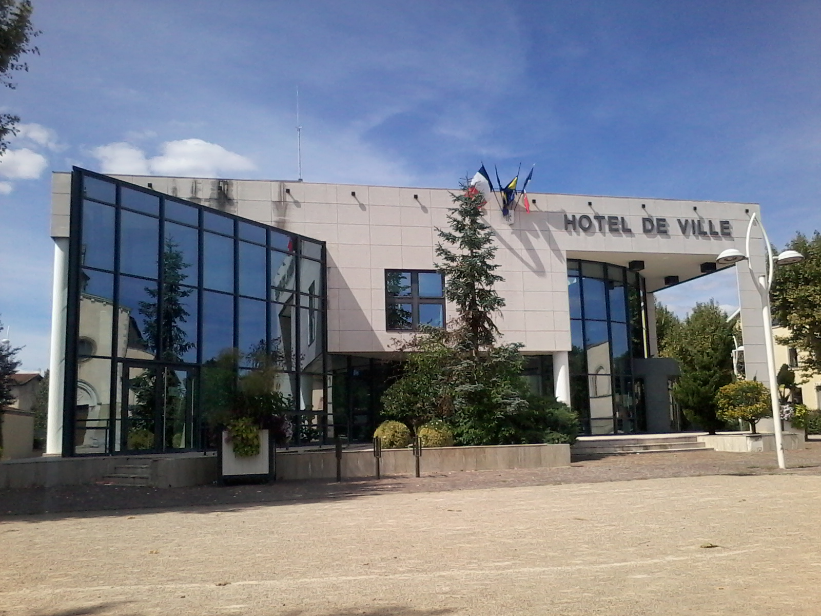 Hôtel de ville de Pont-Évêque (Isère)